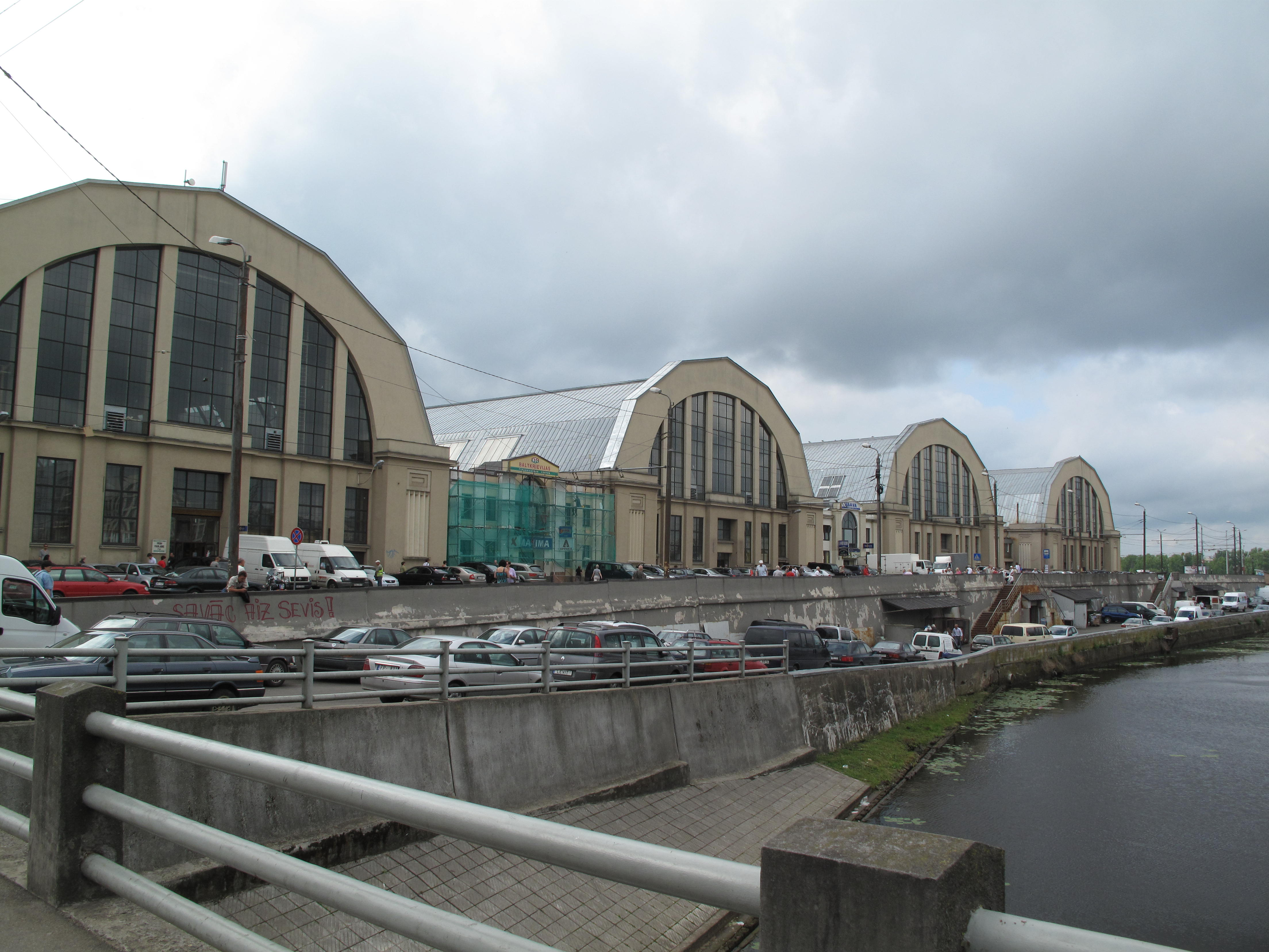 Tržnice v Rize